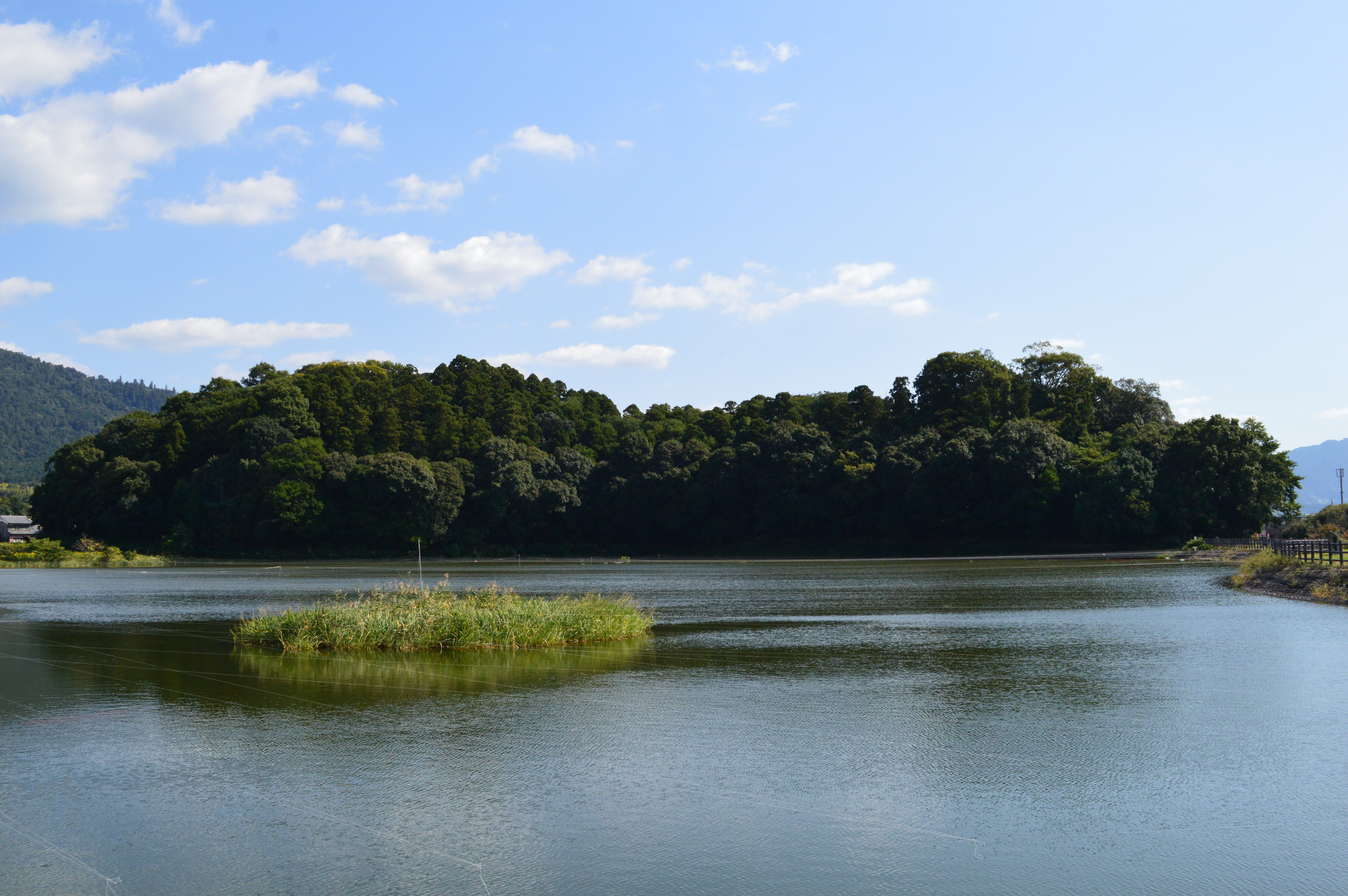 箸墓古墳 全景